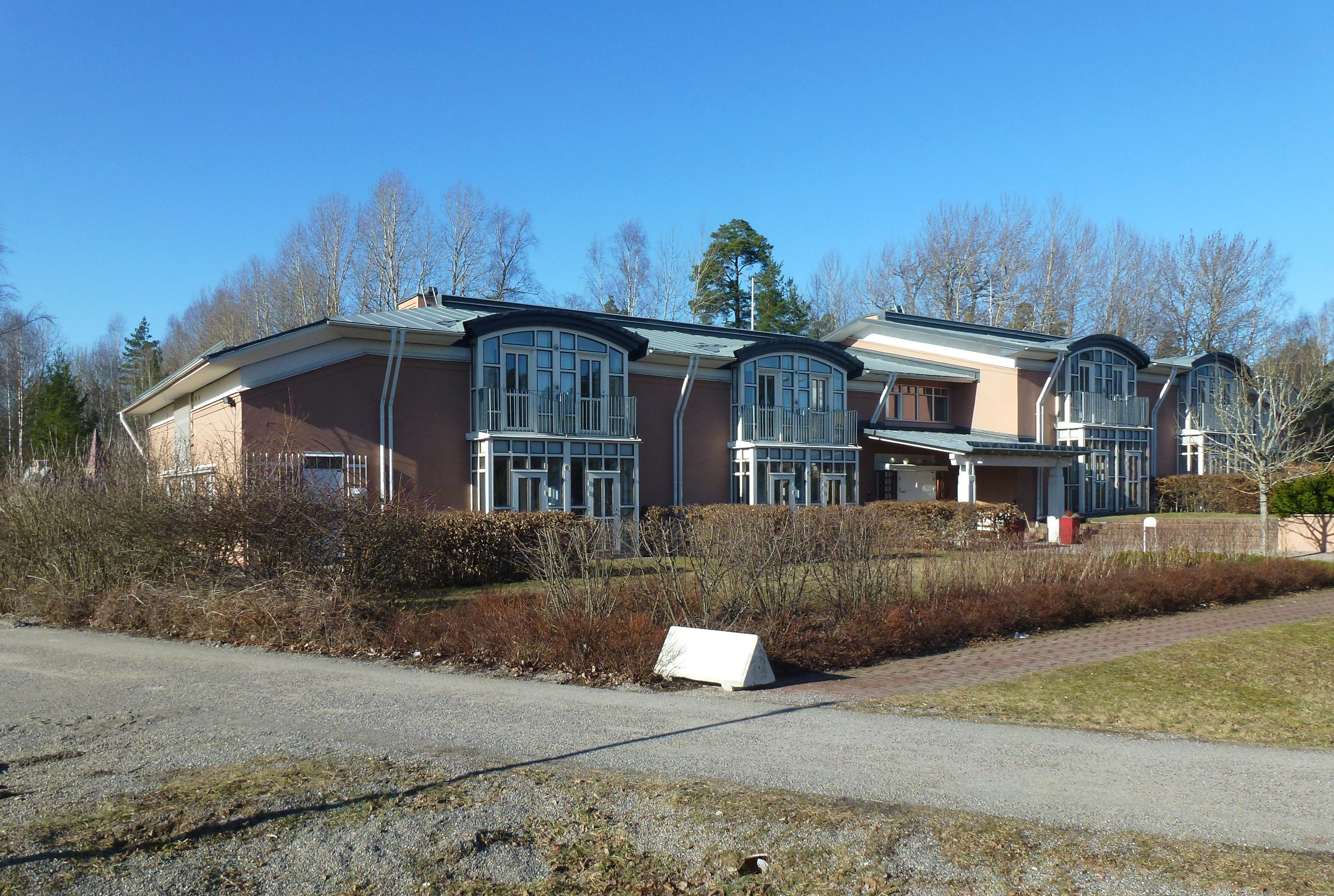 Ronald McDonalds hus vid Karolinska Universitetssjukhuset i Flemingsberg, Huddinge, sydvästra Storstockholm, Alfred Nobels allé 20